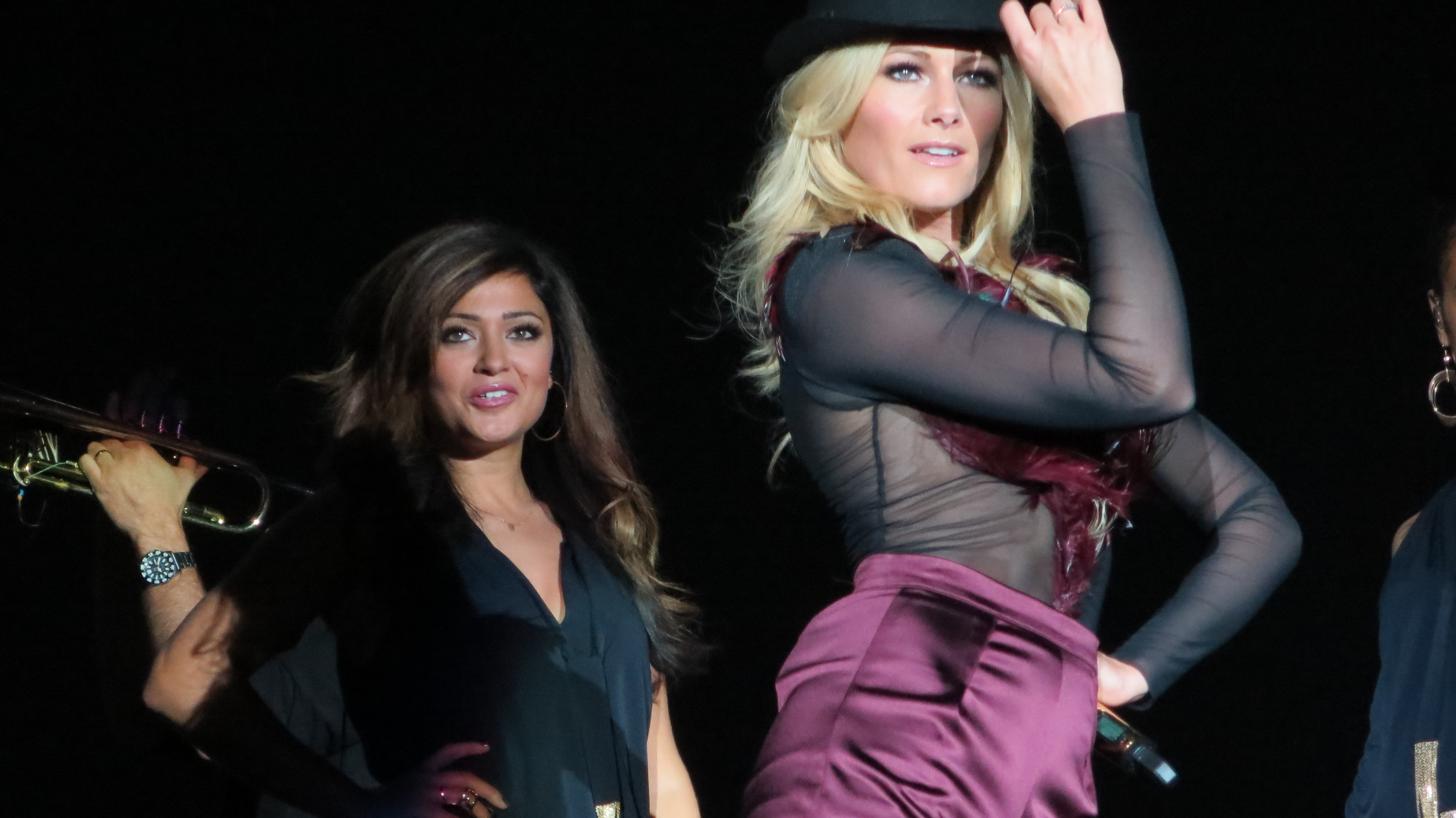 Maria Voskania mit Helene Fischer 2014 während der Farbenspieltour